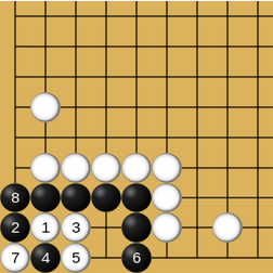 (Étape 3) Exemple de vie et mort dans les coins au jeu de go